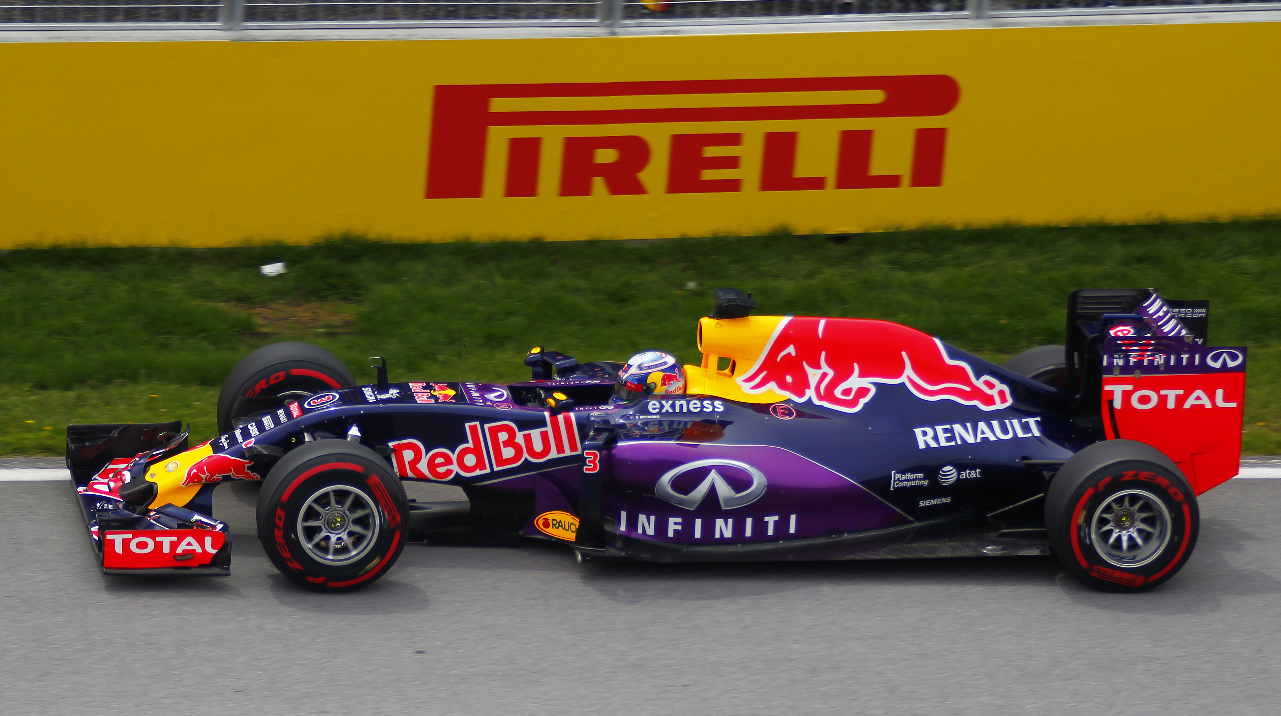 Daniel Ricciardo - Red Bull Racing - Grand Prix du Canada - Circuit Gilles-Villeneuve - 7 juin 2015 (Photo Paul-Émile Poulin-Jacques)